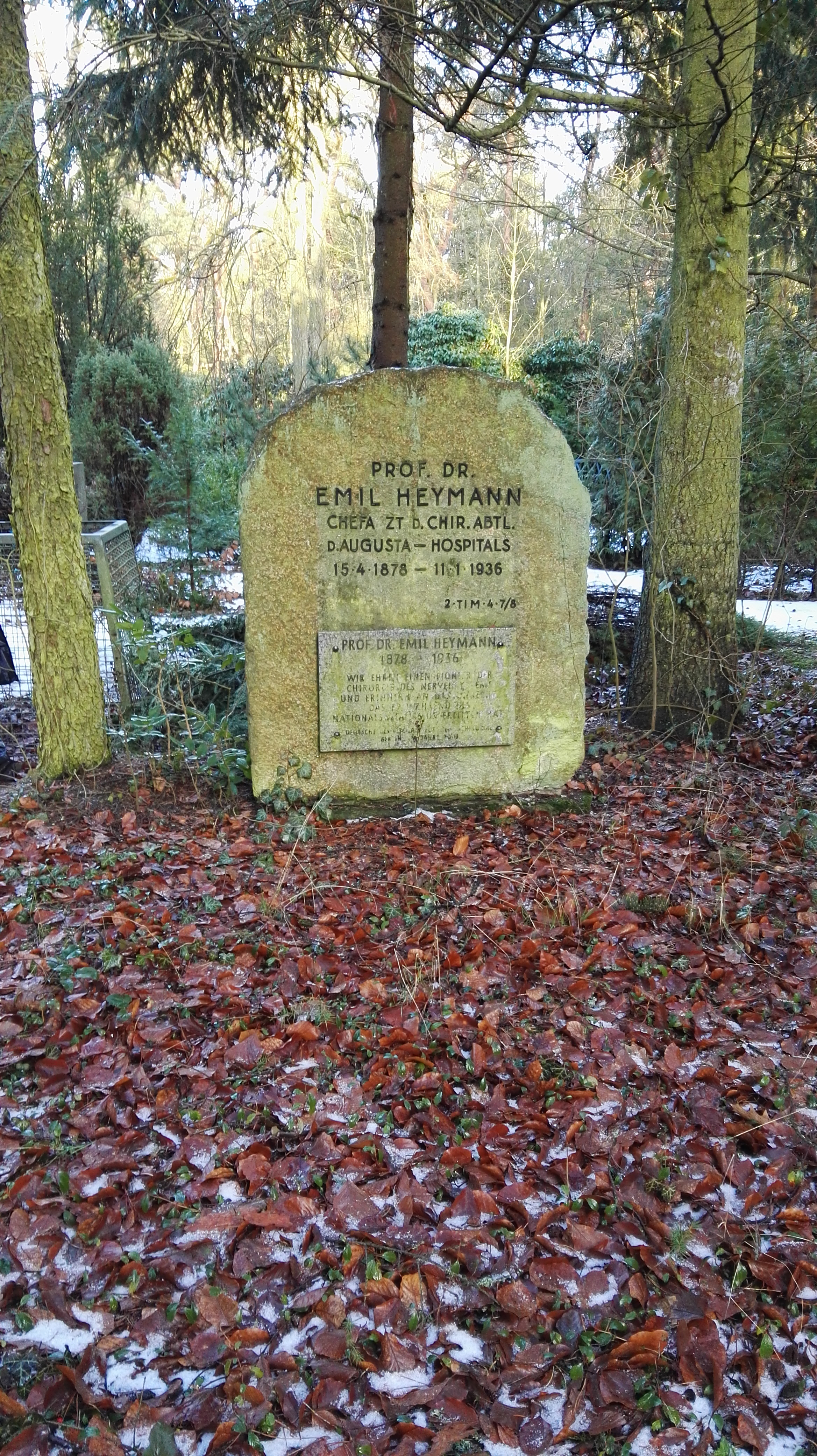 Grab von Emil Heymann auf dem Südwestkirchhof Stahnsdorf